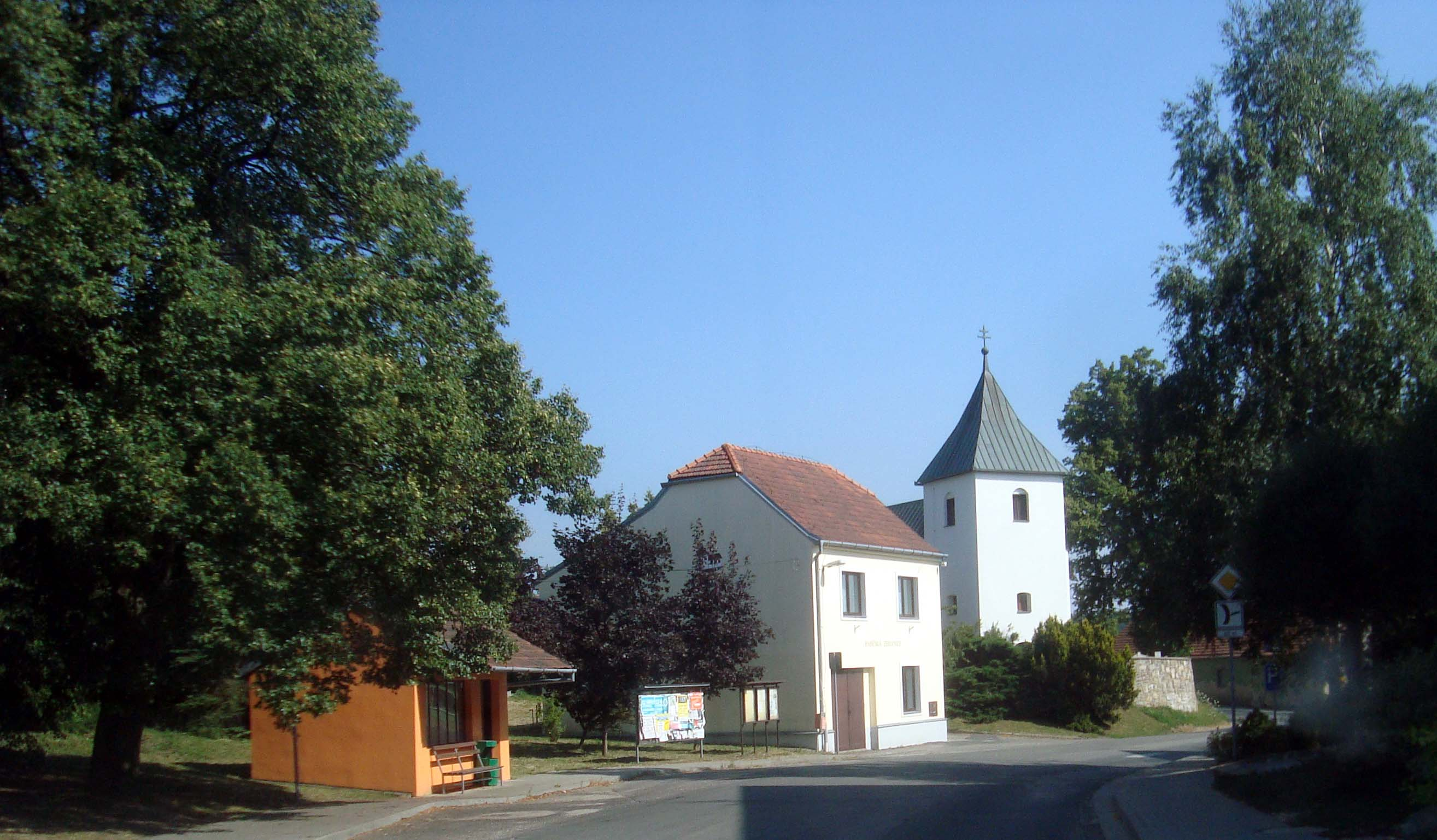 Košíkov, náves s kostelem